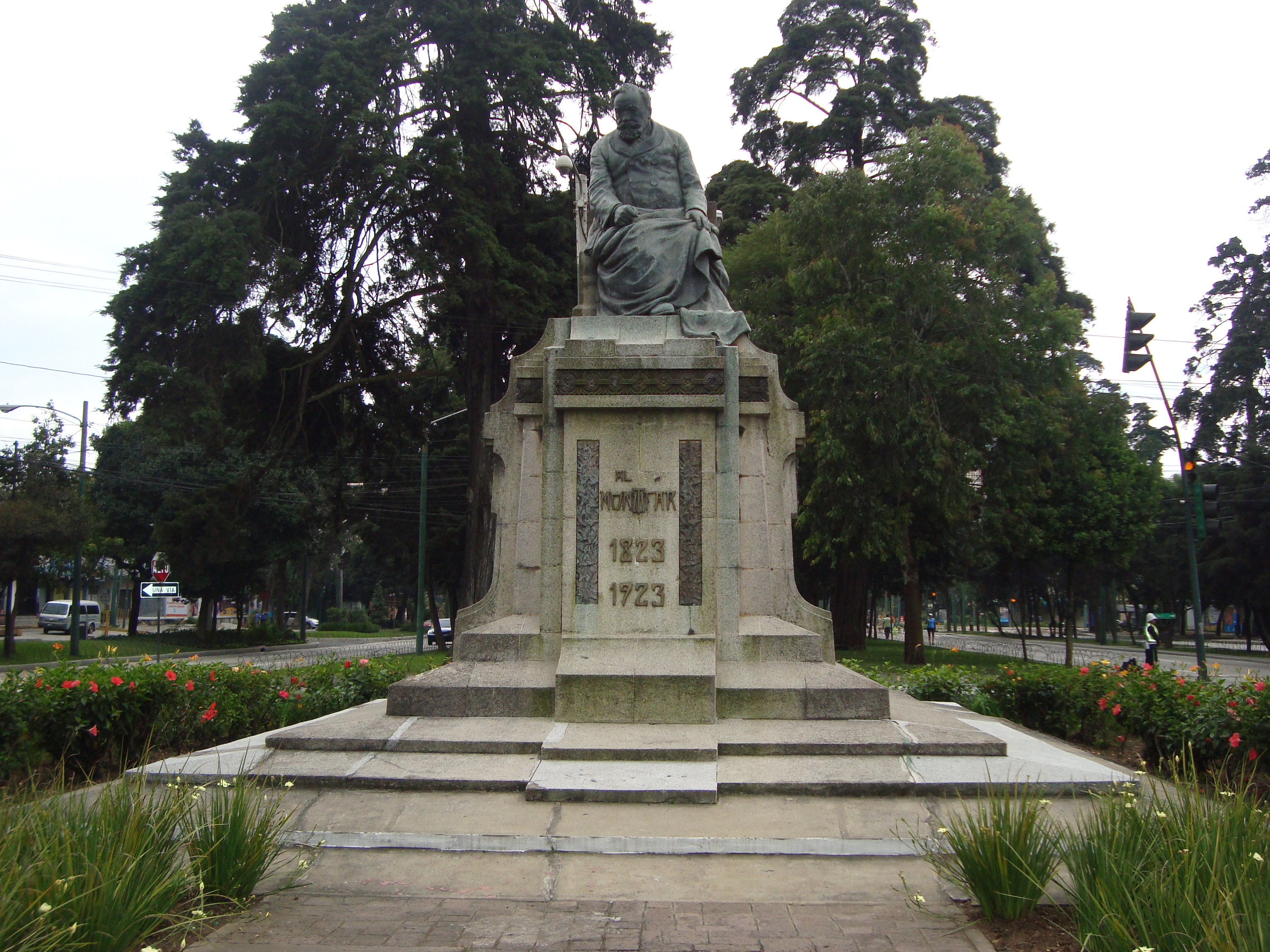 Monumento al Doctor don Lorenzo Montufar, Zona 9 de la Ciudad de Guatemala.